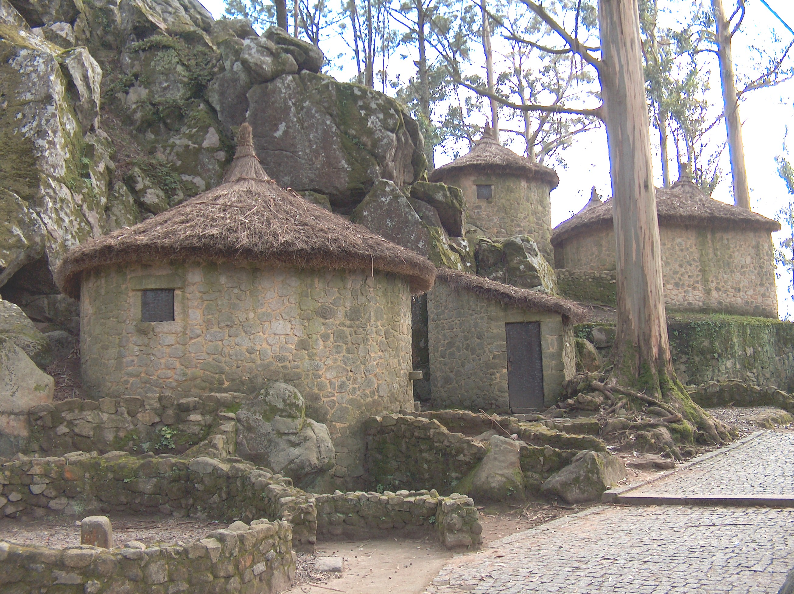 Castro de São Lourenço. Castro de São Lourenço, na freguesia de Vila Chã, conselho de Esposende, distrito de Braga, Portugal.